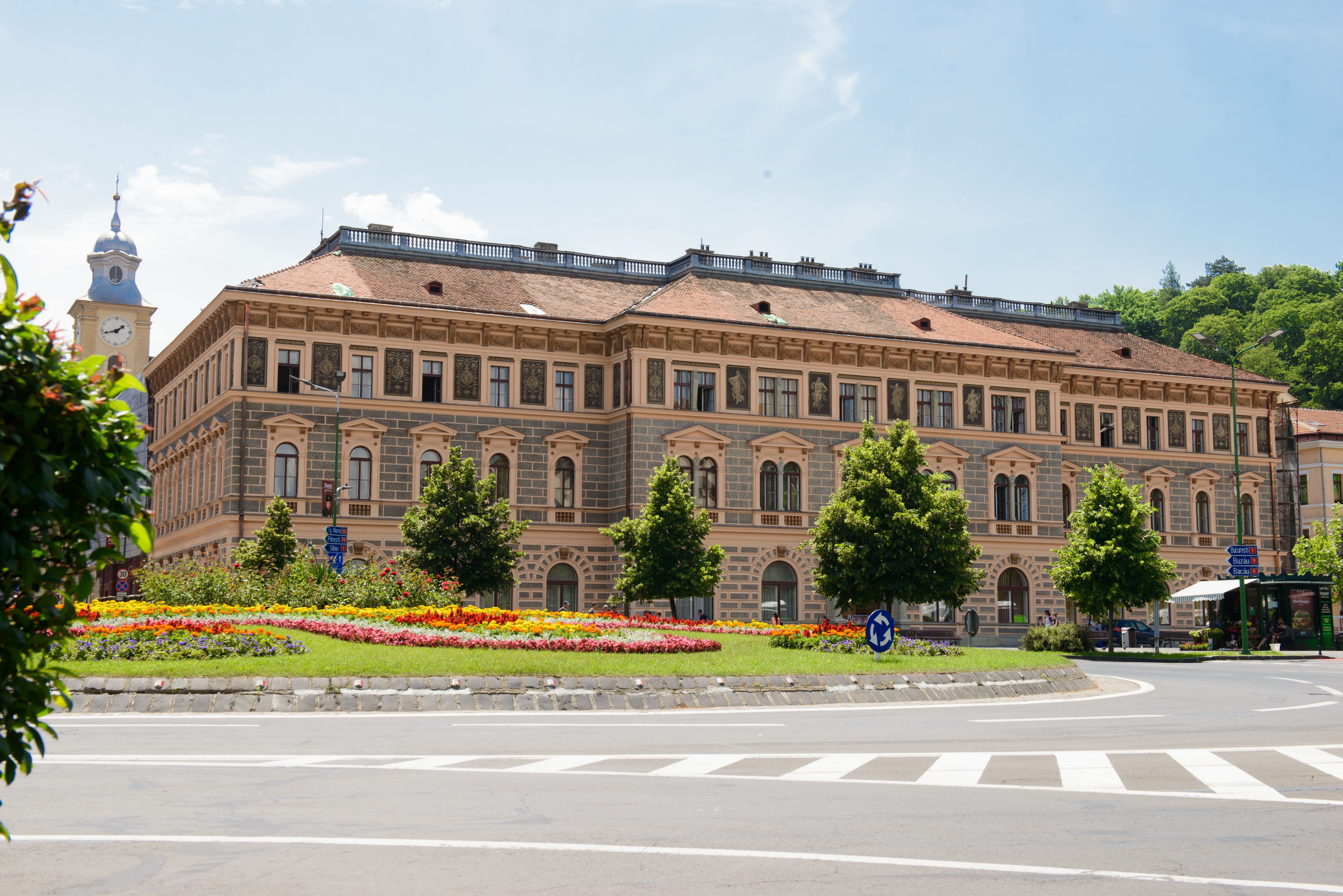 cladirea Rectoratului Universității Transilvania din Brașov în anul 2019